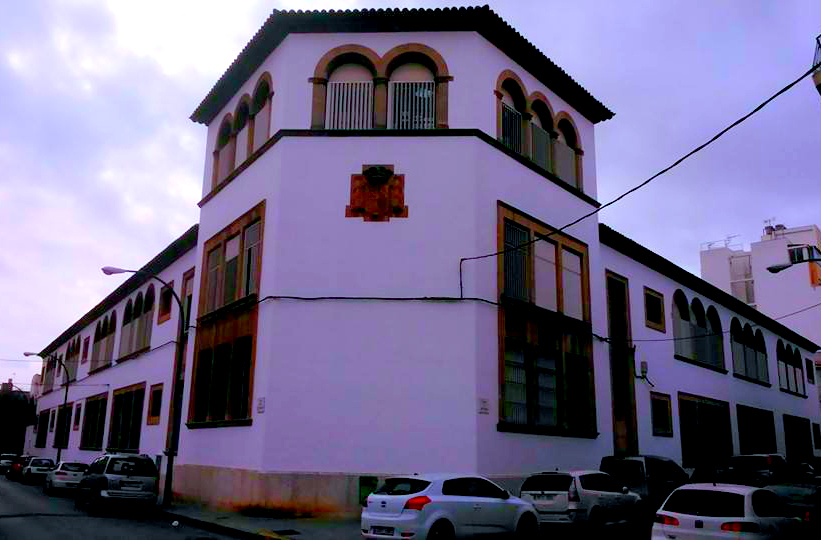 Escuela pública del Barrio de La Soledad (Palma de Mallorca)